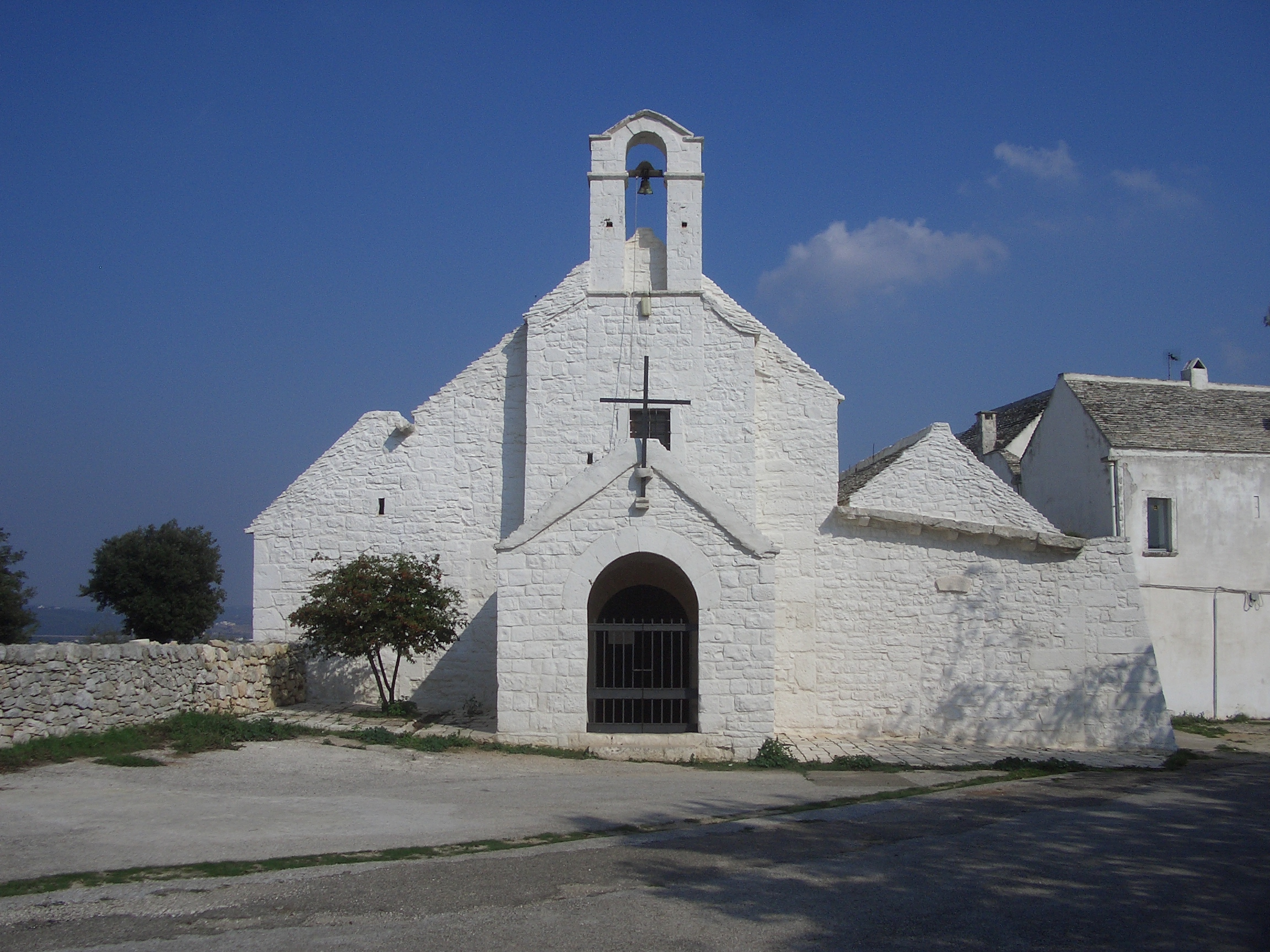 Chiesa di Barsento - Comune di Noci (BA)